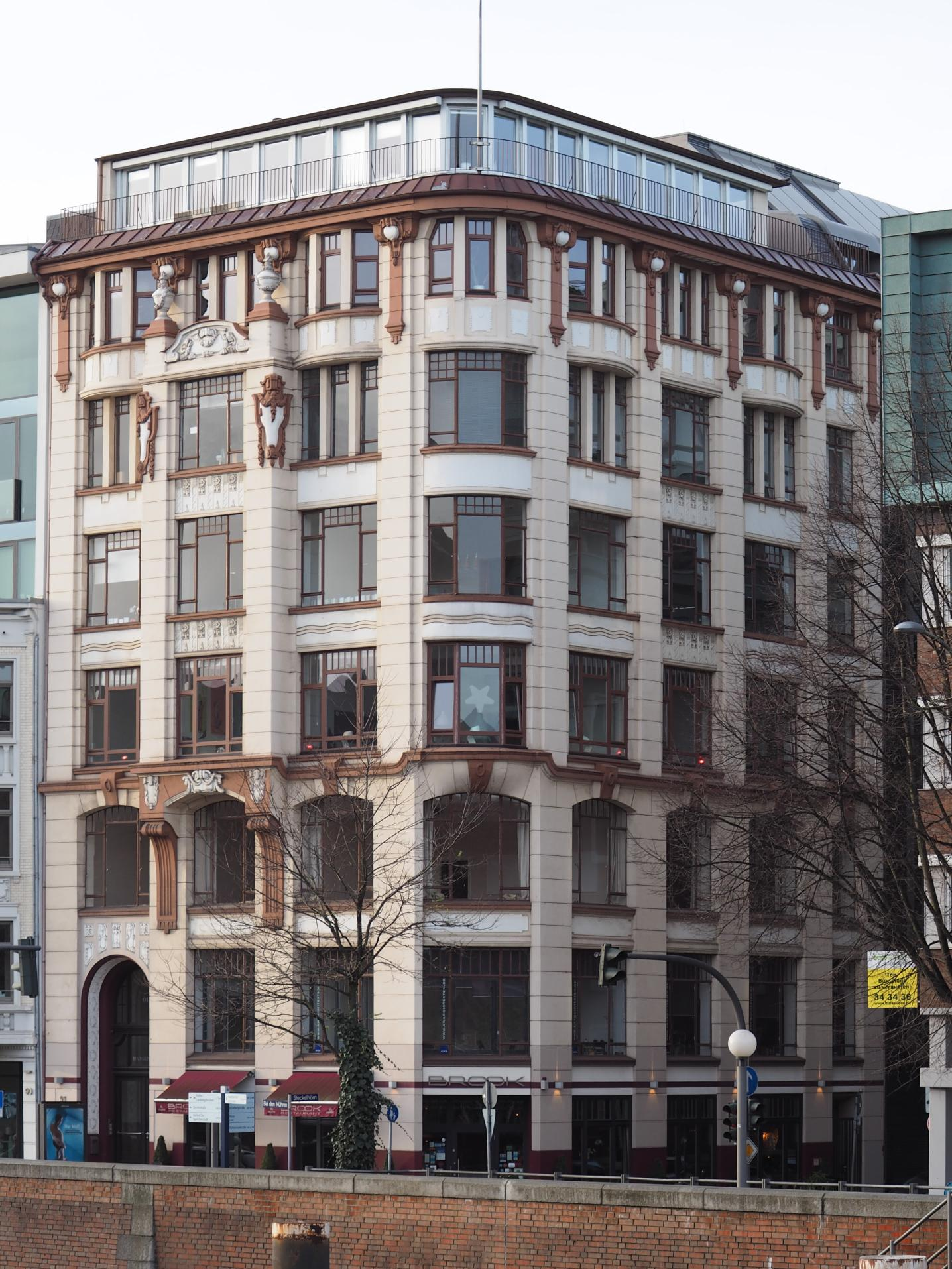 Hamburg-Altstadt, Kontorhaus Hansaburg, Foto: Dezember 2015